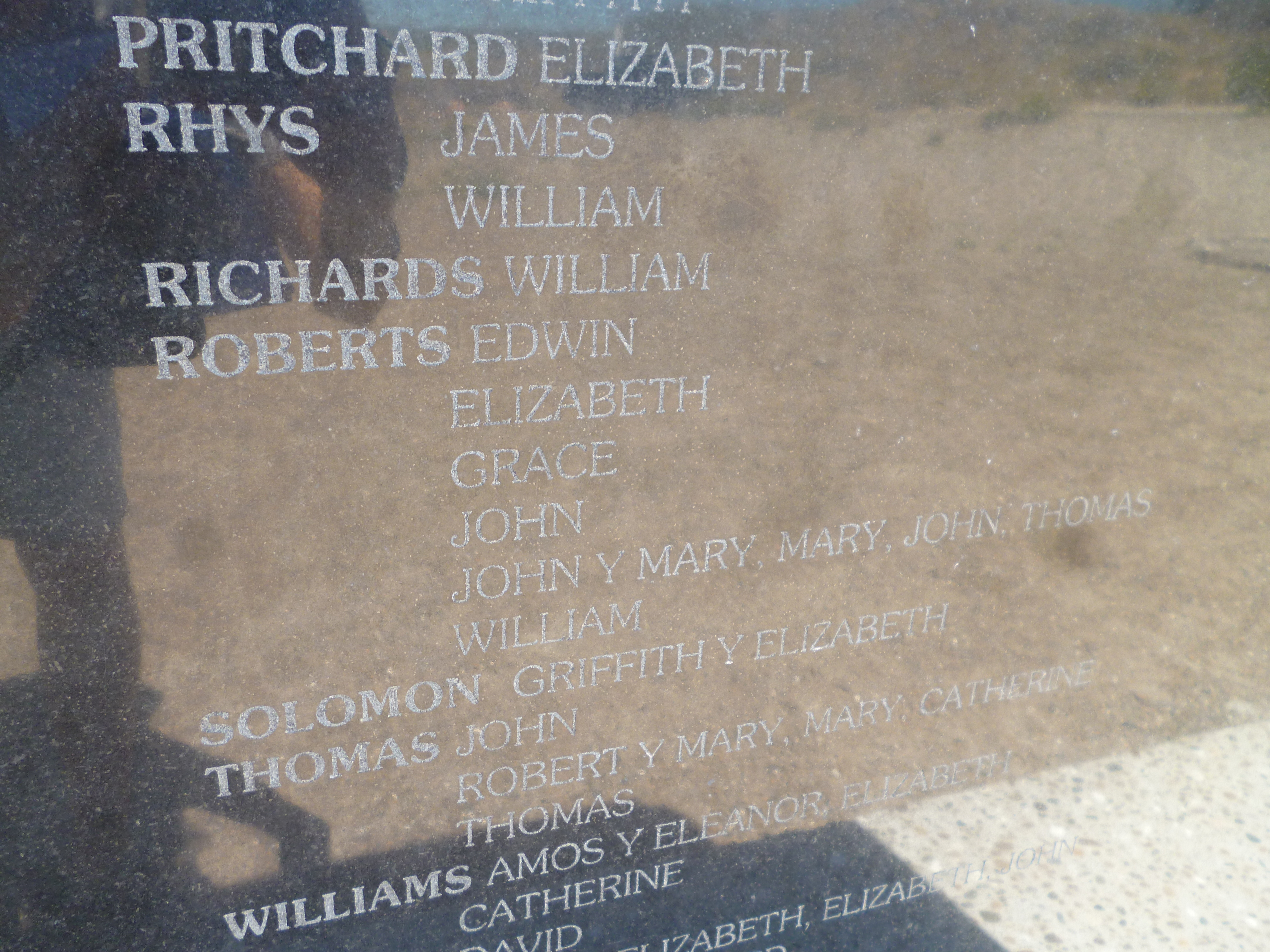 Monumento al desembarco galés, Punta Cuevas, Y Wladfa. La placa contiene los nombres de todos los colonos llegados en el Mimosa